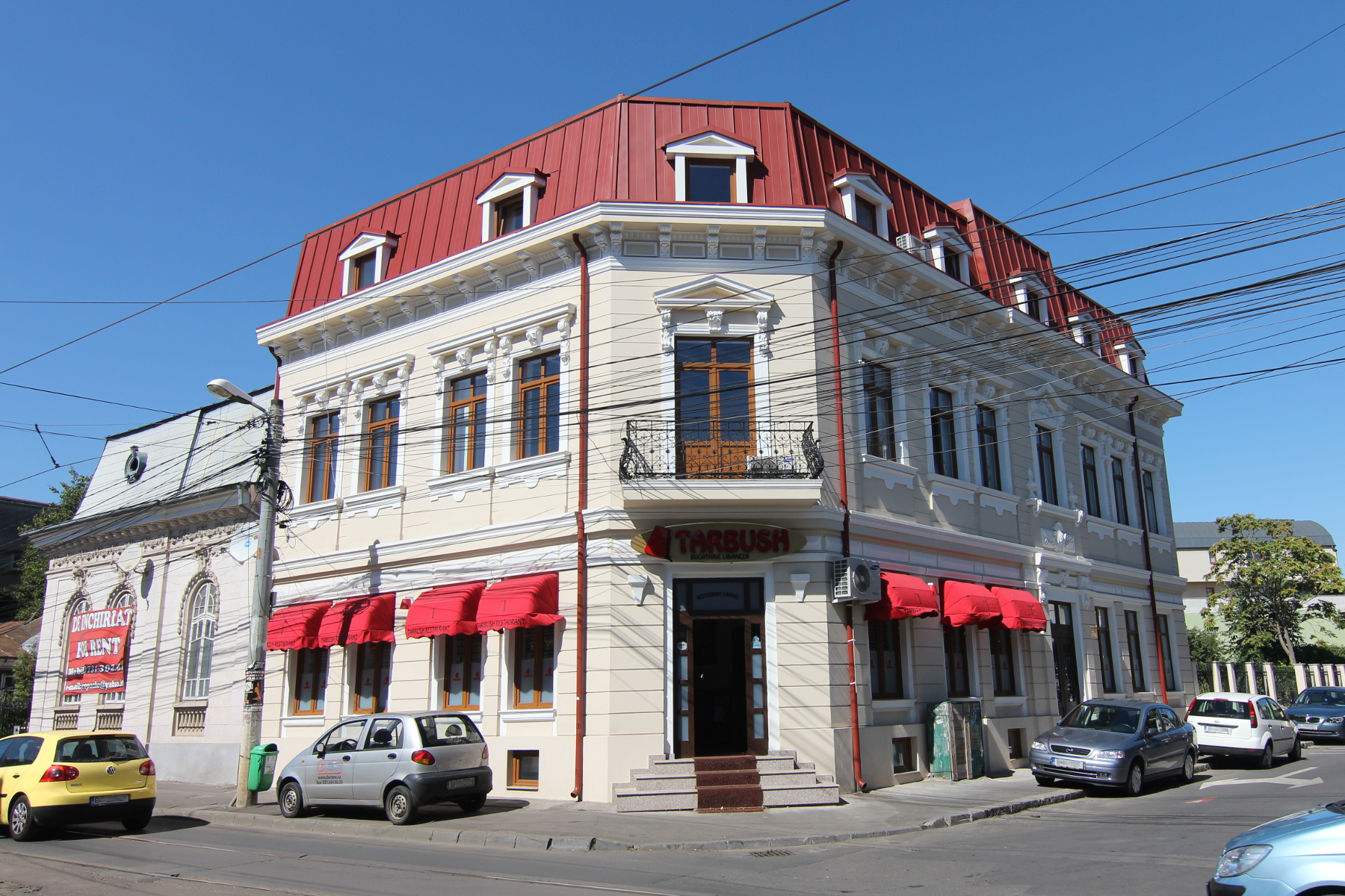 Casă pe Calea Călărașilor